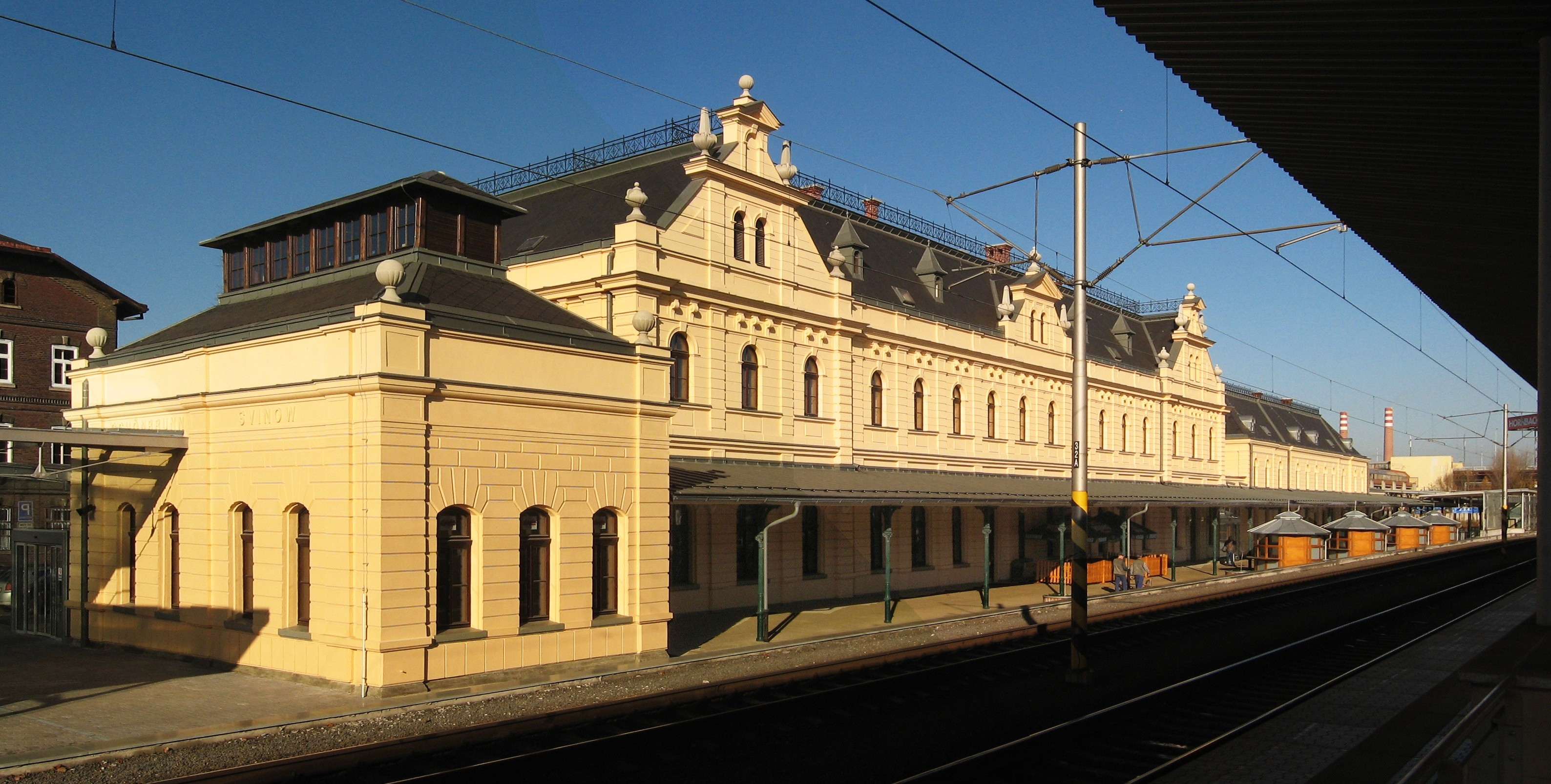 Ostrava-Svinov, nádražní budova, nápis na fasádě vlevo: Svinow, Schönbrunn (složeno ze dvou snímků pomocí programu hugin)